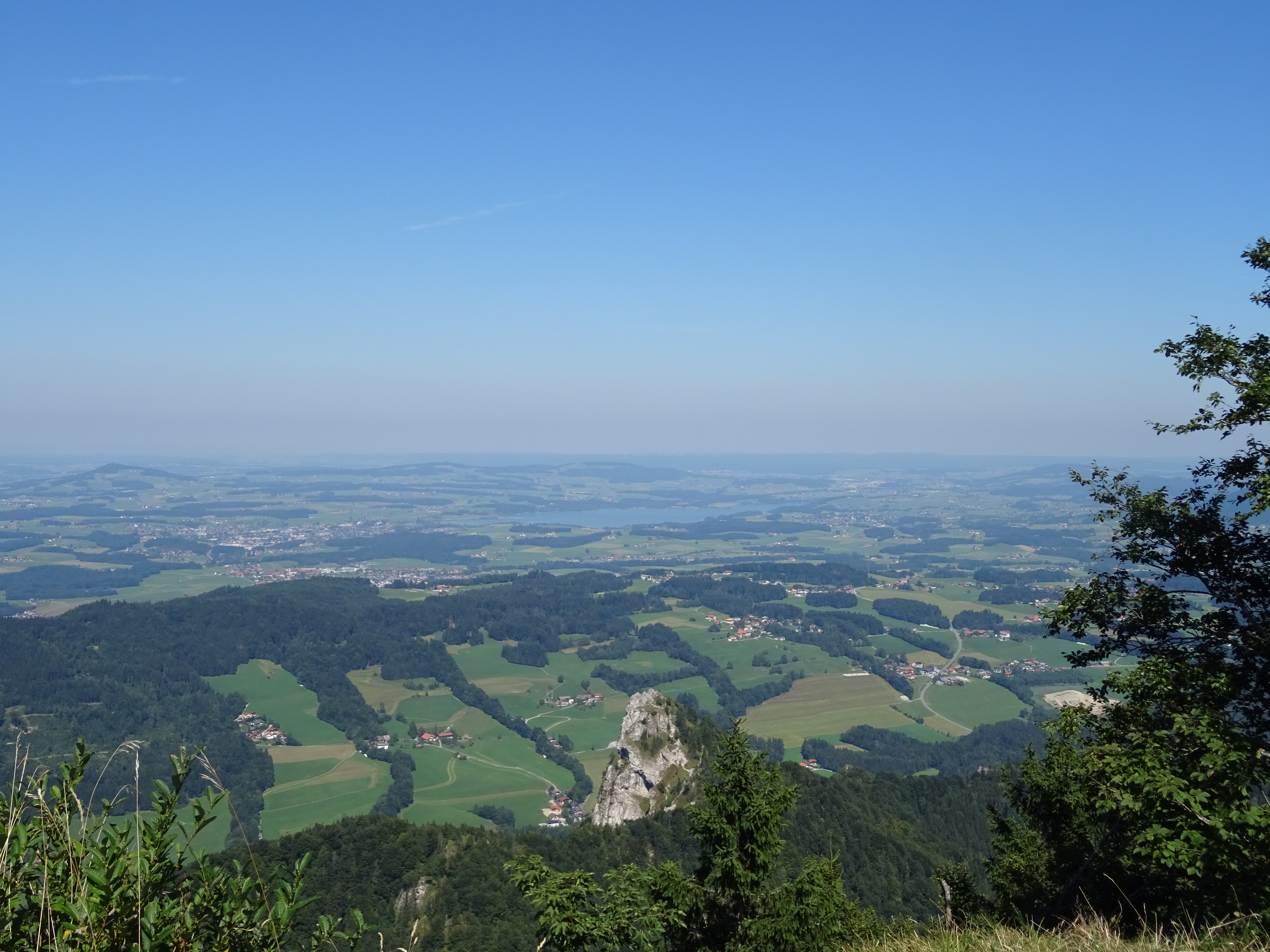 Ausblick vom Gaisberggipfel in Richtung Wallersee. Die felsige Nase die von unten ins Bild hineinragt ist der Nockstein.